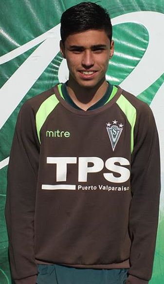 Edición de la fotografía "MartinArenas.jpg", que muestra al jugador de fútbol Martín Arenas.